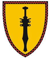 Grb Vitez